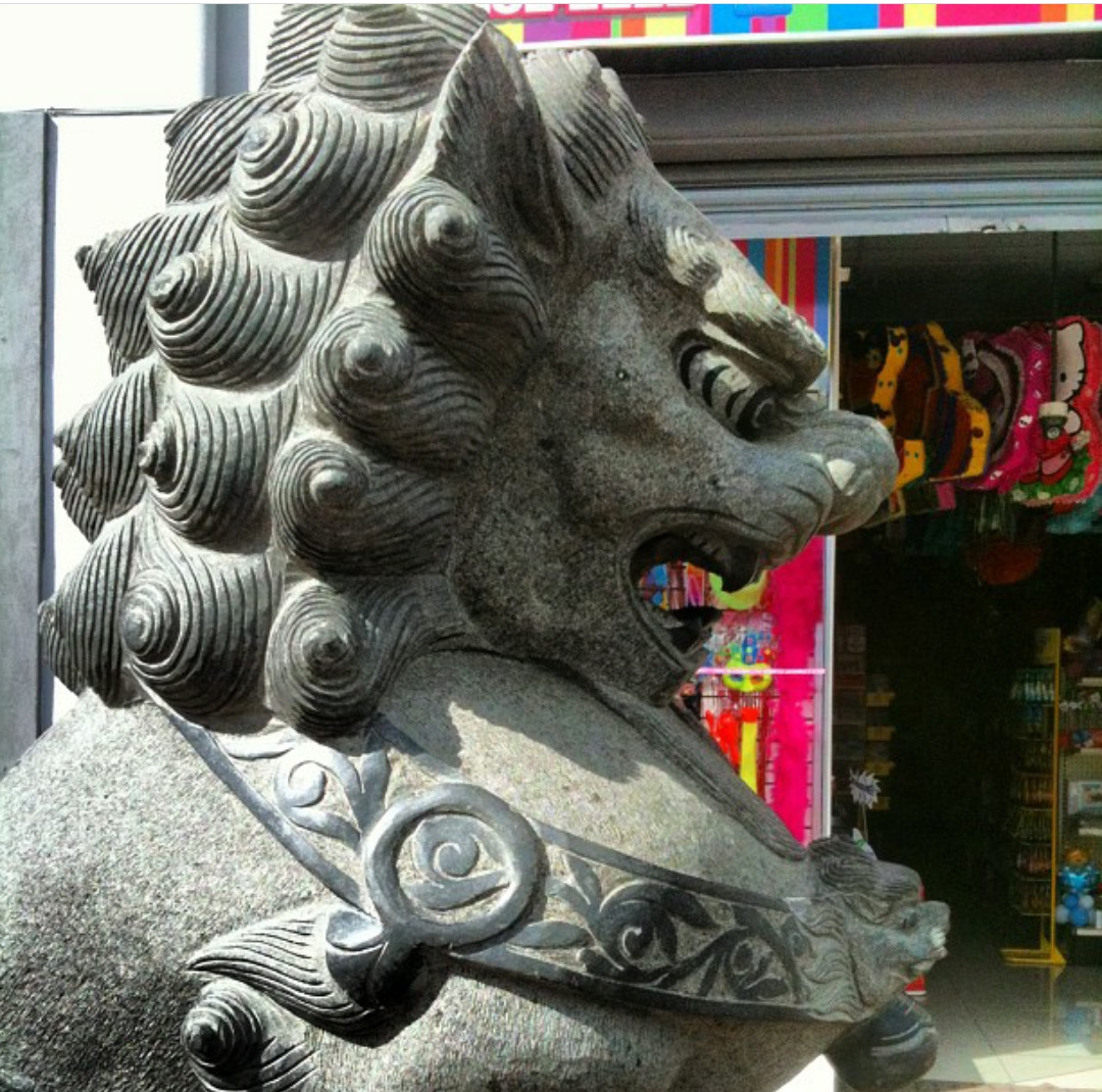 Estatua en el Barrio Chino de San José